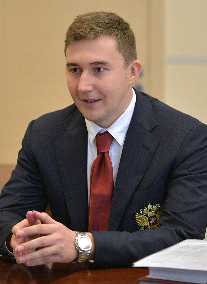 Шахматист Сергей Карякин во время встречи с Президентом России Владимиром Путиным